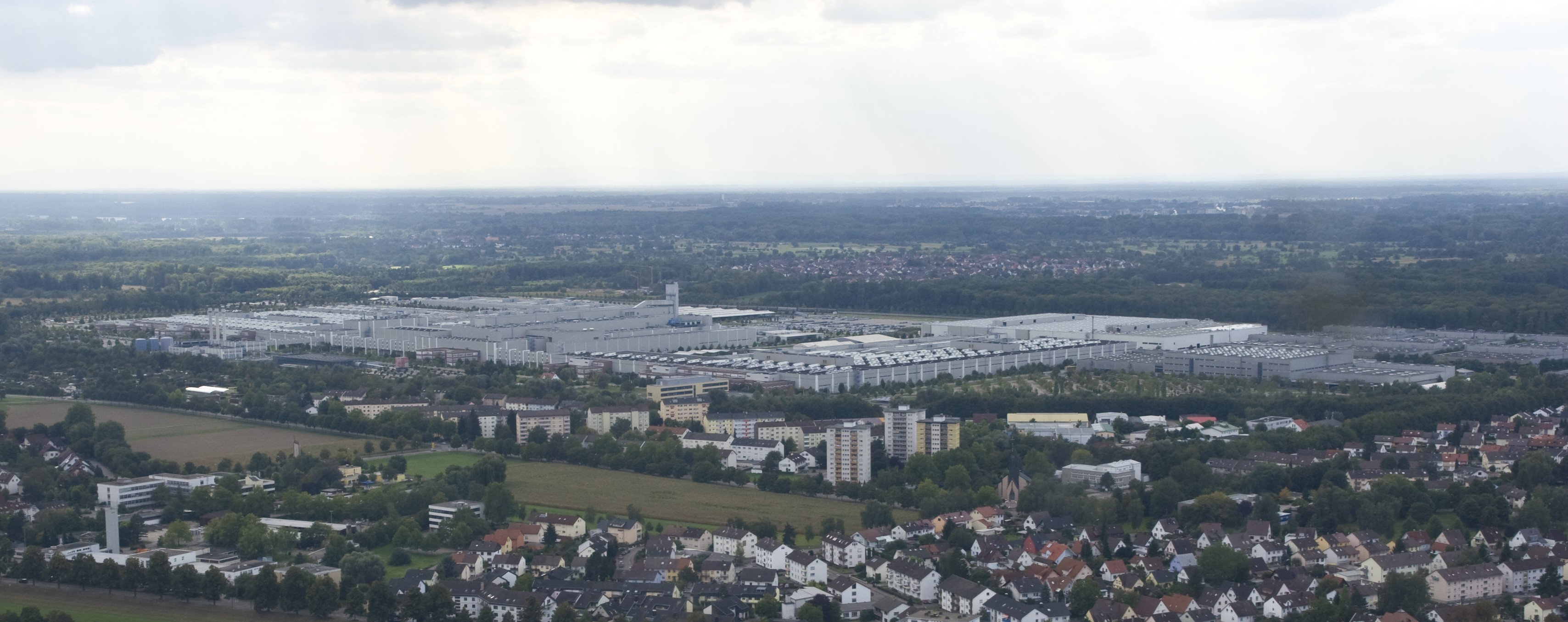 Das Mercedes-Benz Werk in Rastatt, ein Produktionswerk der A- und B-Klasse des Daimler Konzerns.